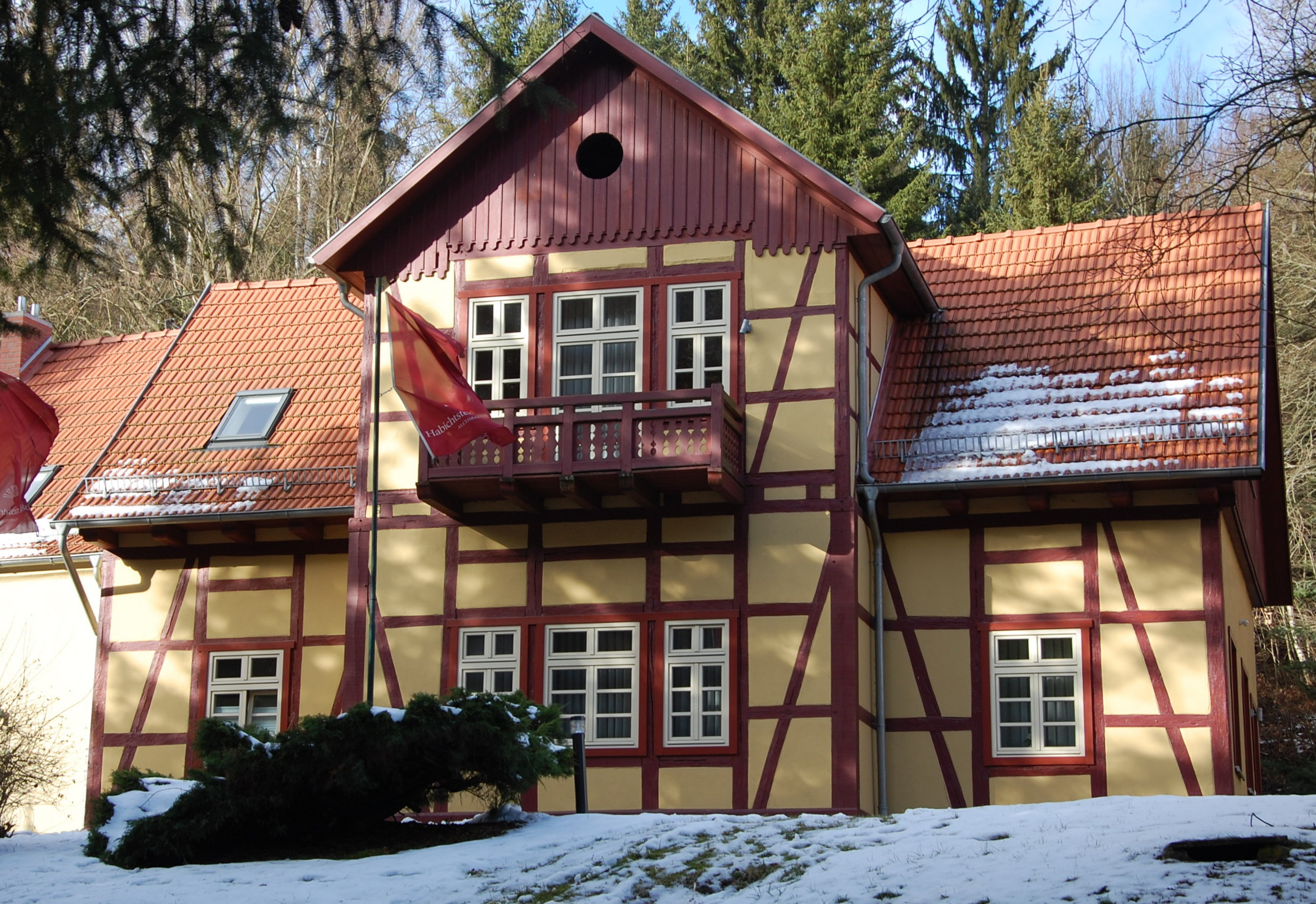 Haus Kreisstraße 6 in Alexisbad